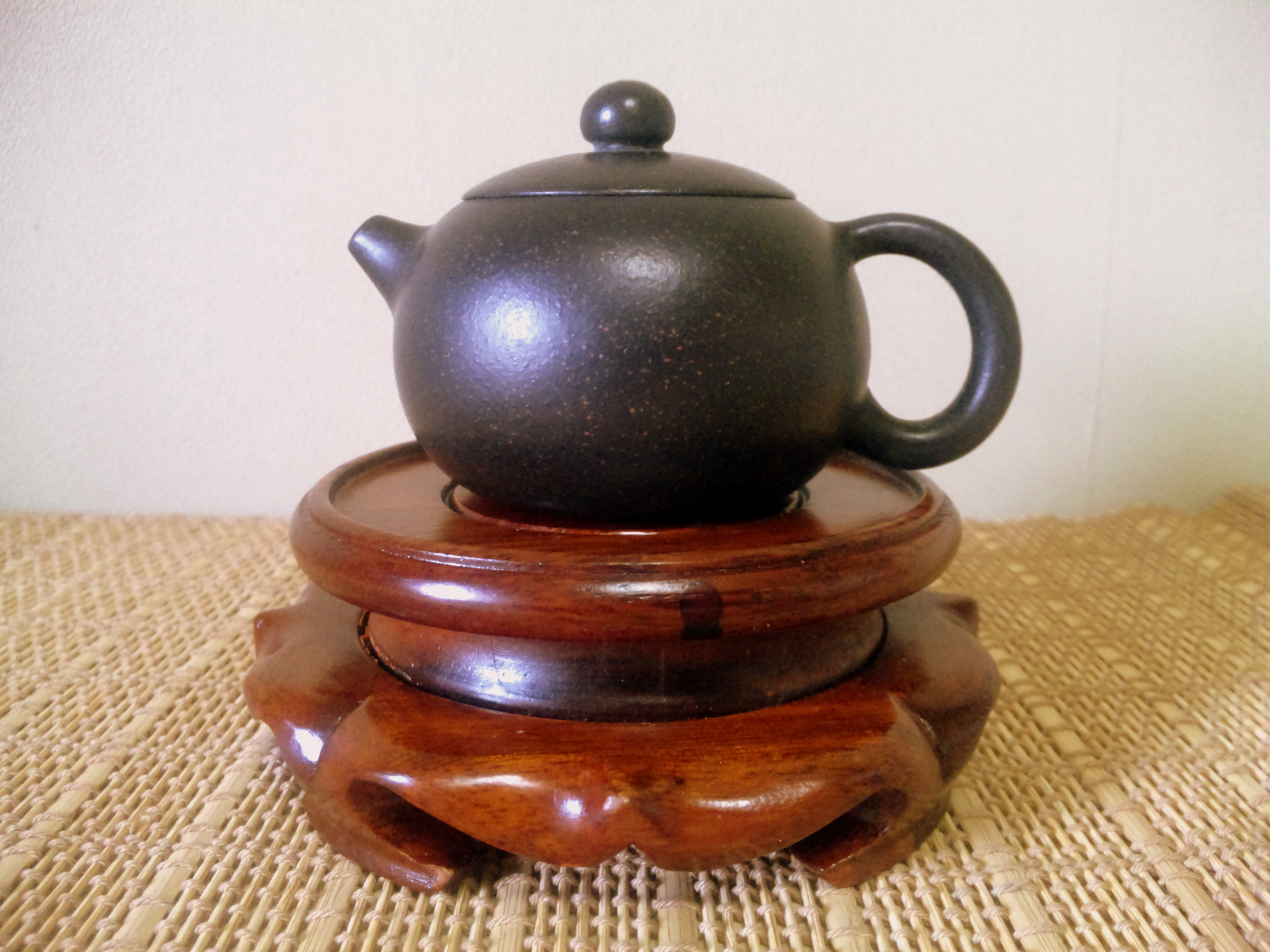 茶座と茶壺。 静葉所有